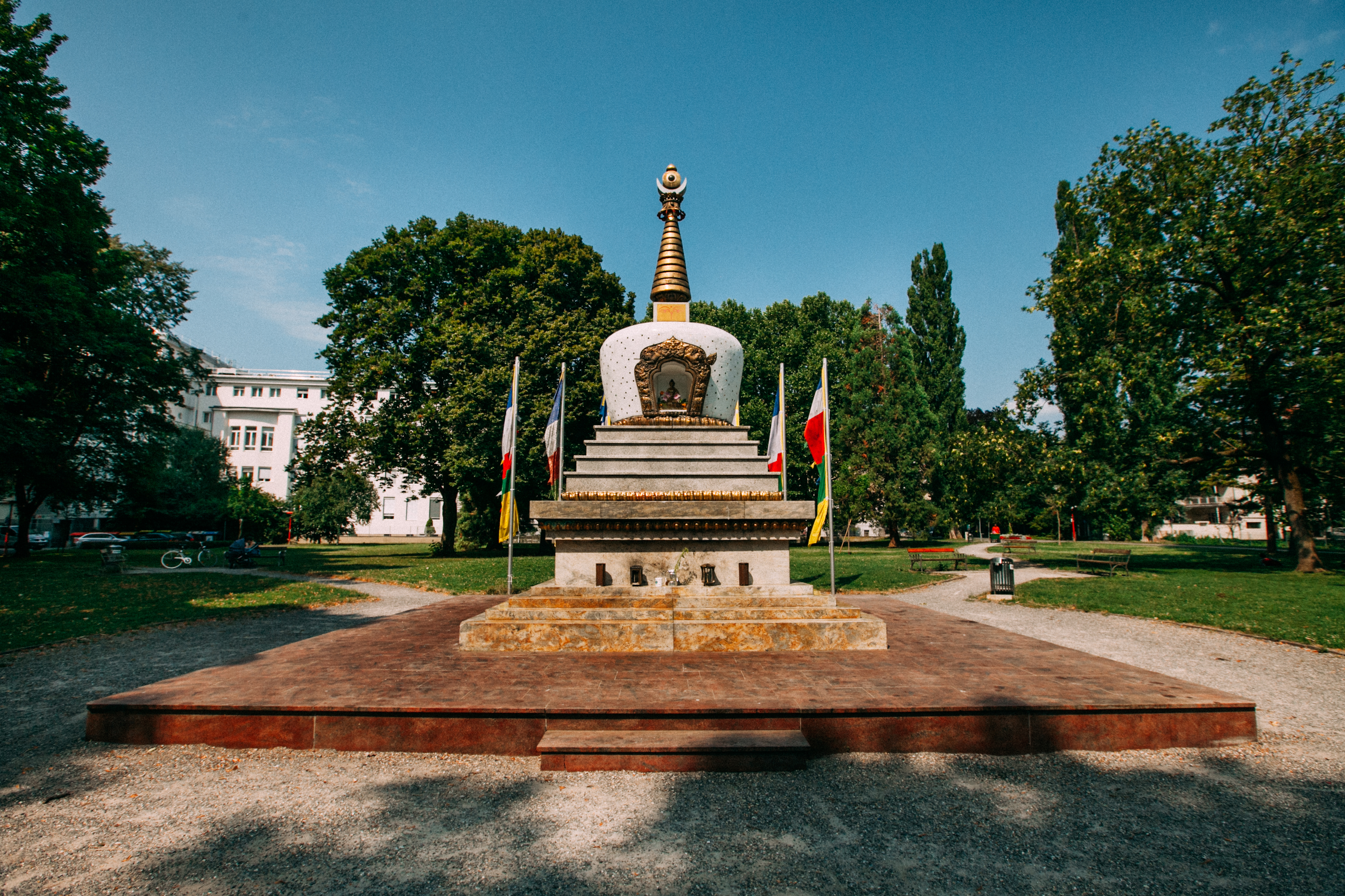 Stupa